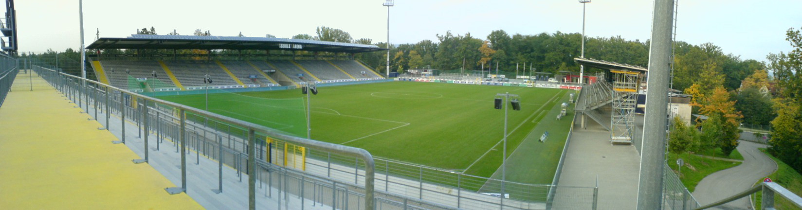 Blick auf das Spielfeld des Fussballstadions "Scholz-Arena" in Aalen mit Zuschauertribünen, gesehen vom E-Block.